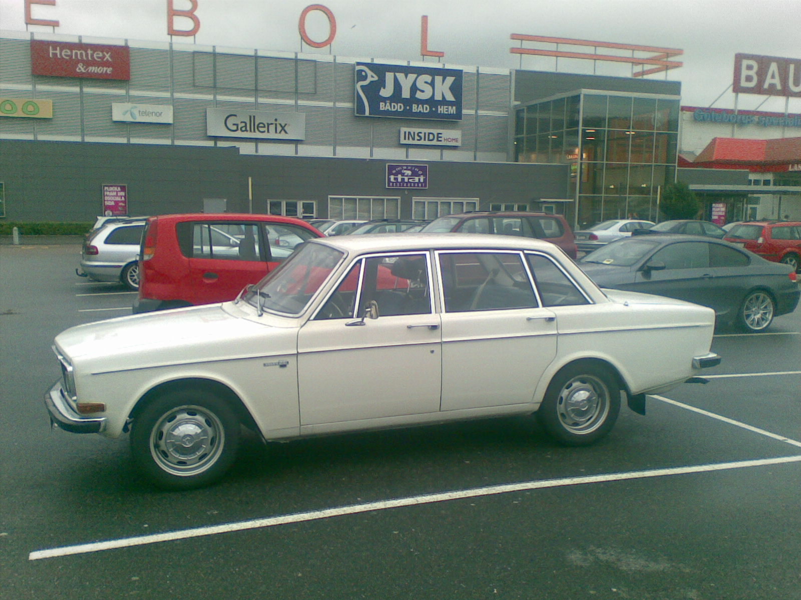 Volvo 144